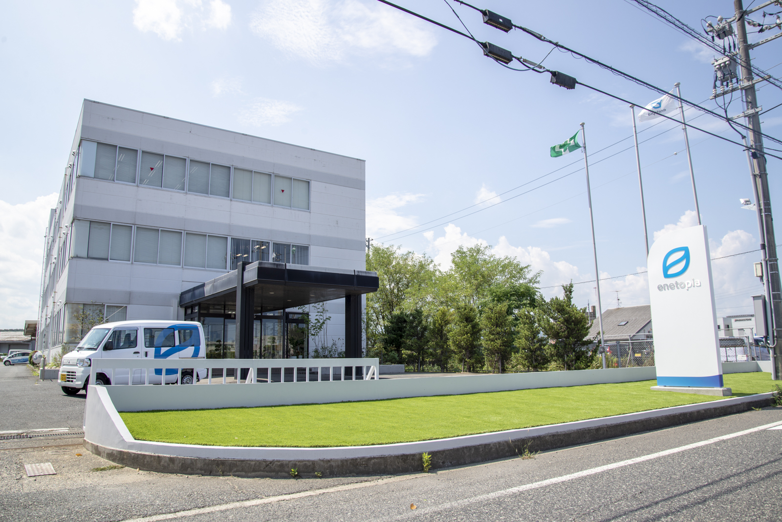 TottoriGasbuilding